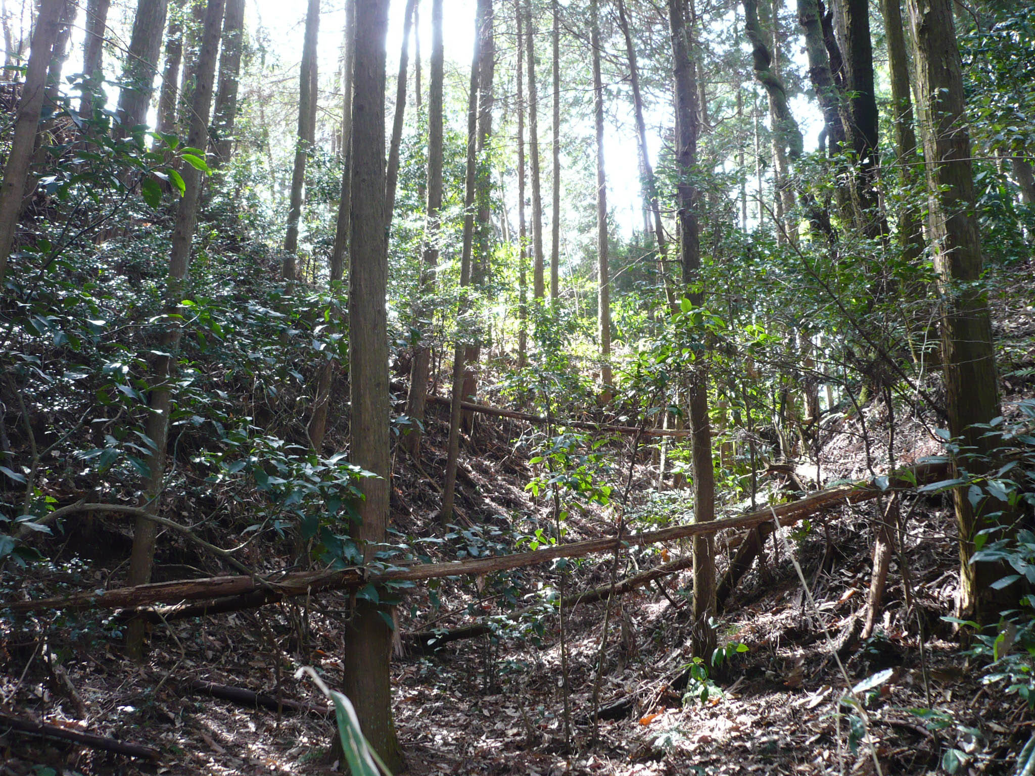 北側空堀跡